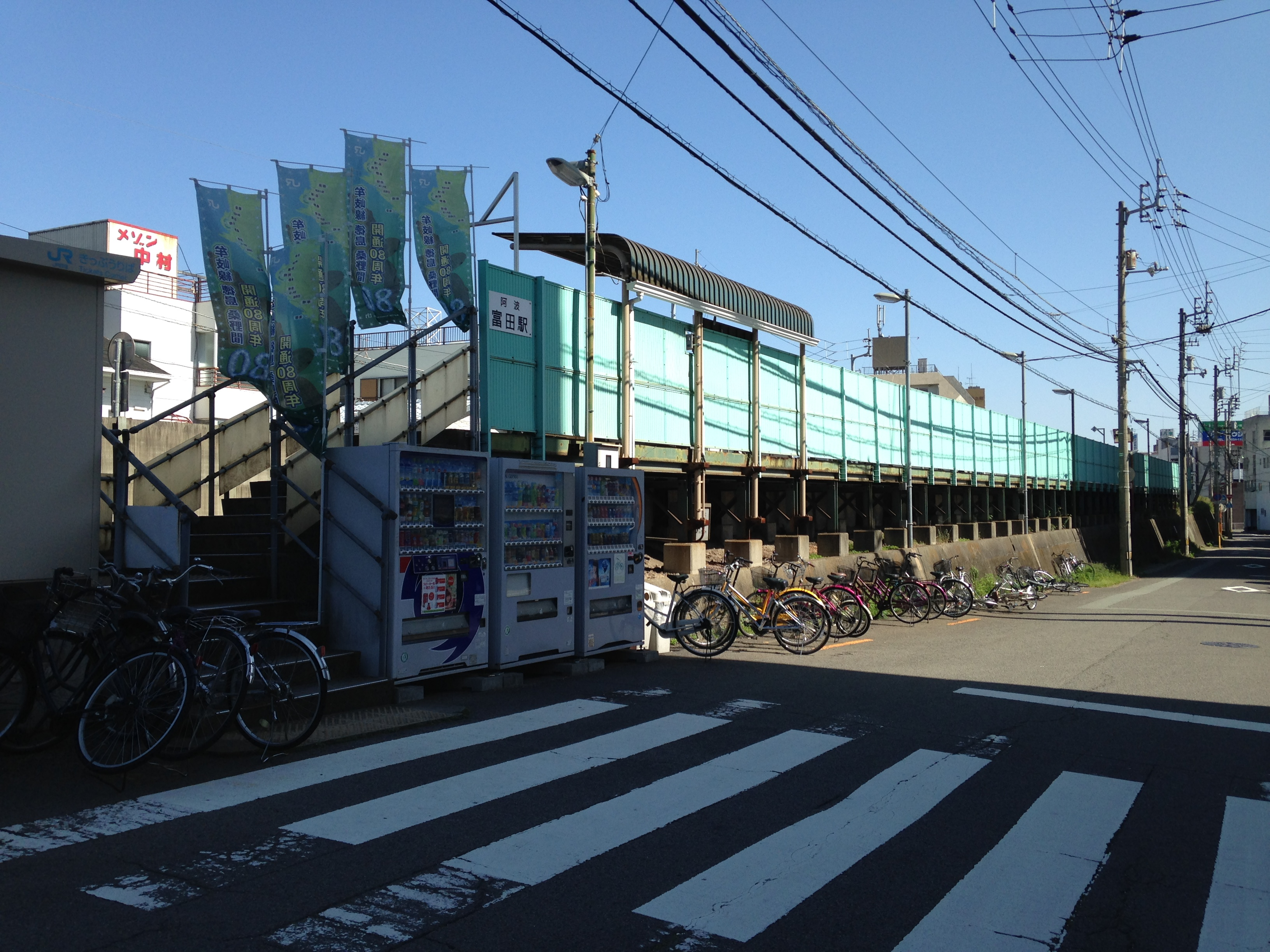 阿波富田駅の駅舎